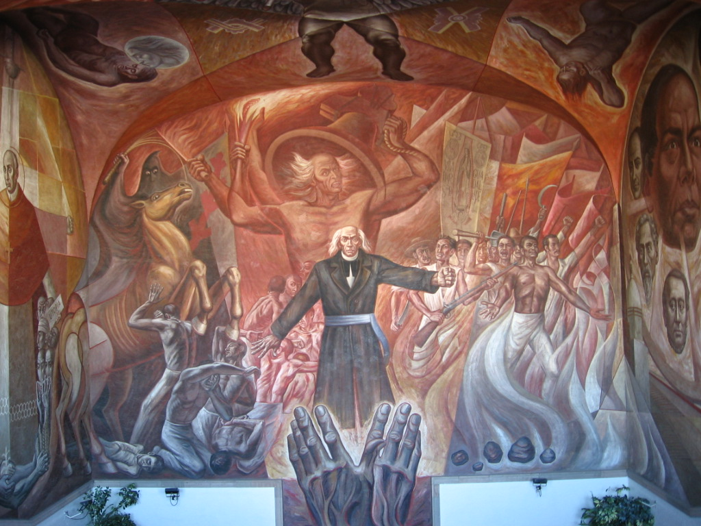 Mural of Miguel Hidalgo y Costilla